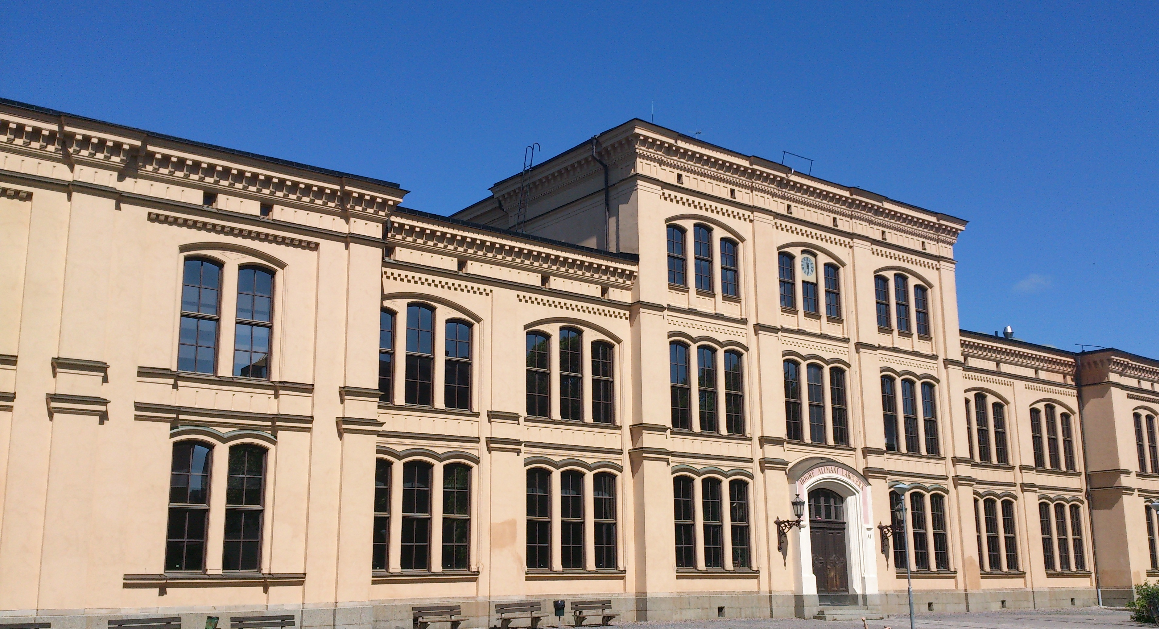 Katedralskolans huvudbyggnad 2 juni 2014